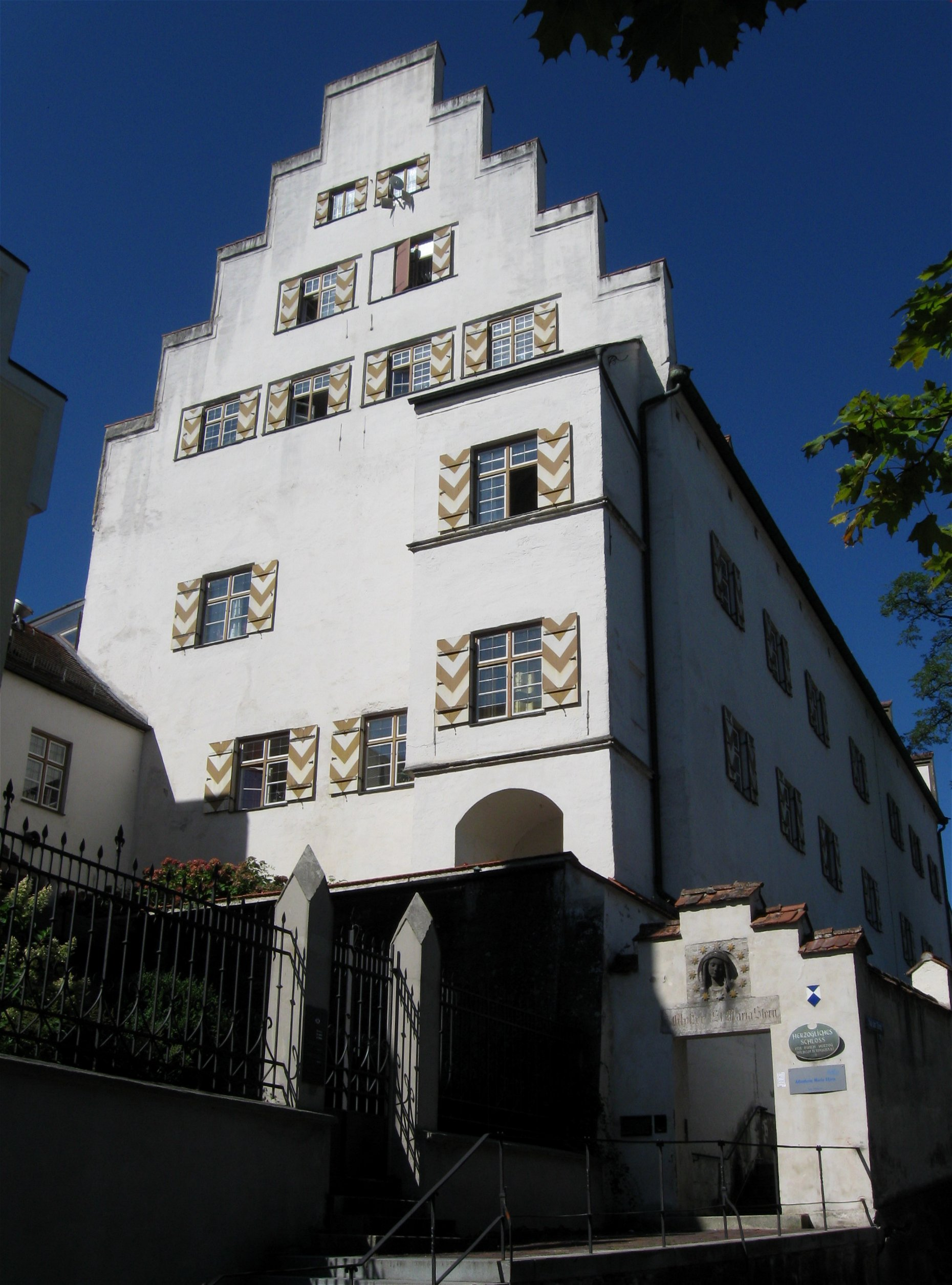 Auf der Burg 3. Ehem. herzogliches, später kurfürstliches Schloss, seit 1909 Franziskanerinnenkloster, seit 1947 Altenheim, dreigeschossiger spätgotischer Satteldachbau mit Treppengiebeln, mit Resten der mittelalterlichen Wehrmauer, 1531; Ziehbrunnen; Gartenmauer, gotisierend, um 1900.